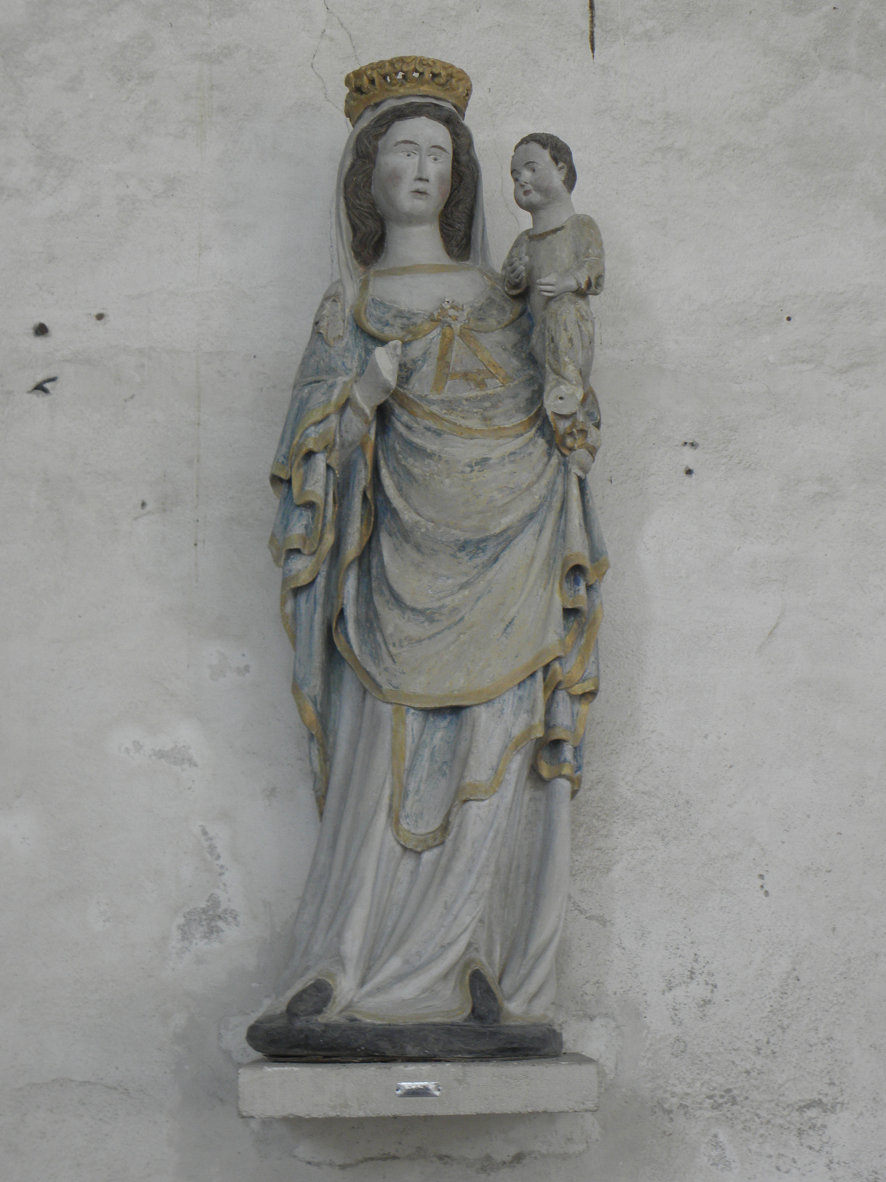 Église Saint-Jean de Béré à Châteaubriant (44). Intérieur. Statue de la Vierge à l'Enfant.